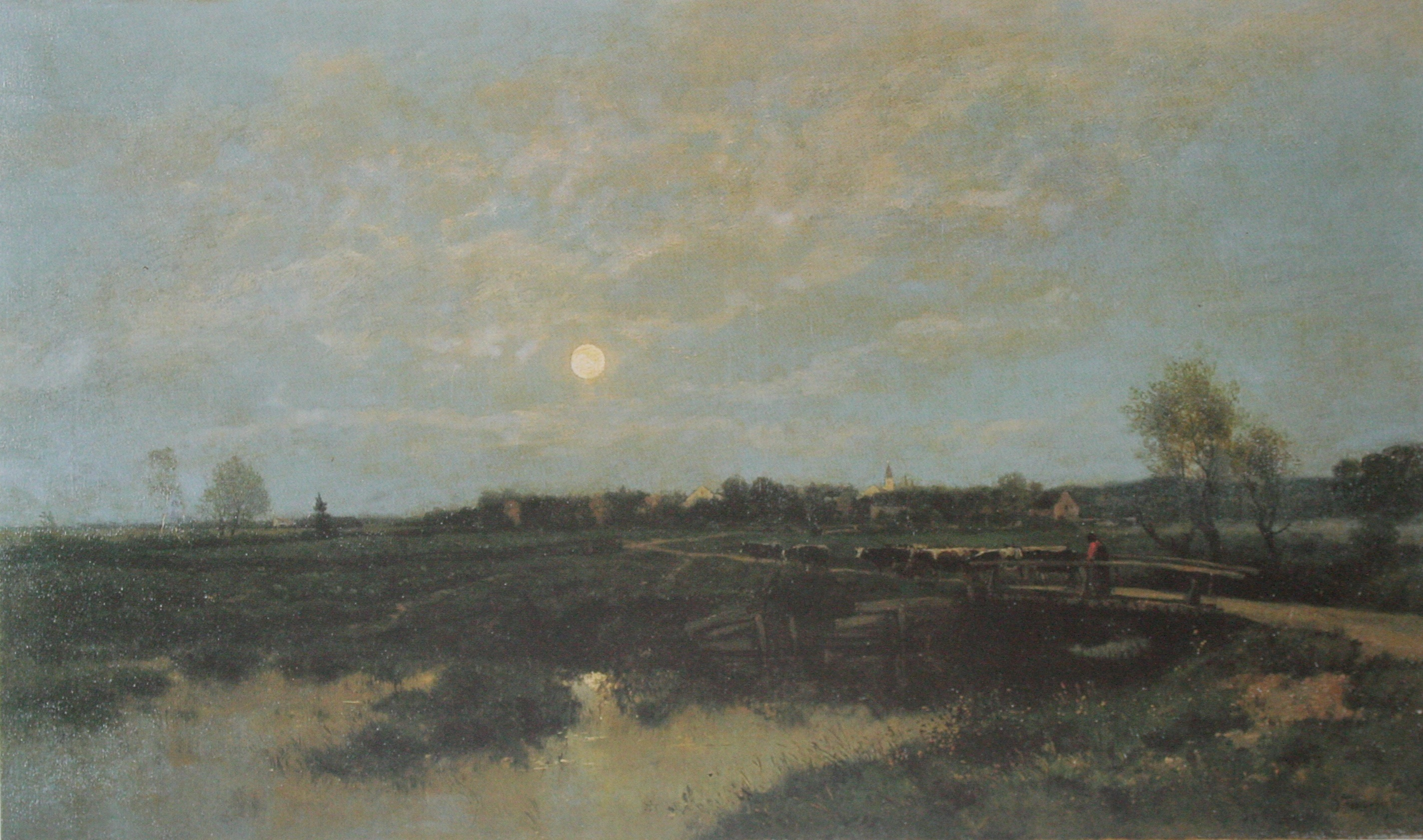 Dämmerung_in_der_Gegend_von_Dachau_, Gemälde von Otto Frölicher, 1880, 61 x 106 cm, Tempera auf Holz, Kunstmuseum Olten